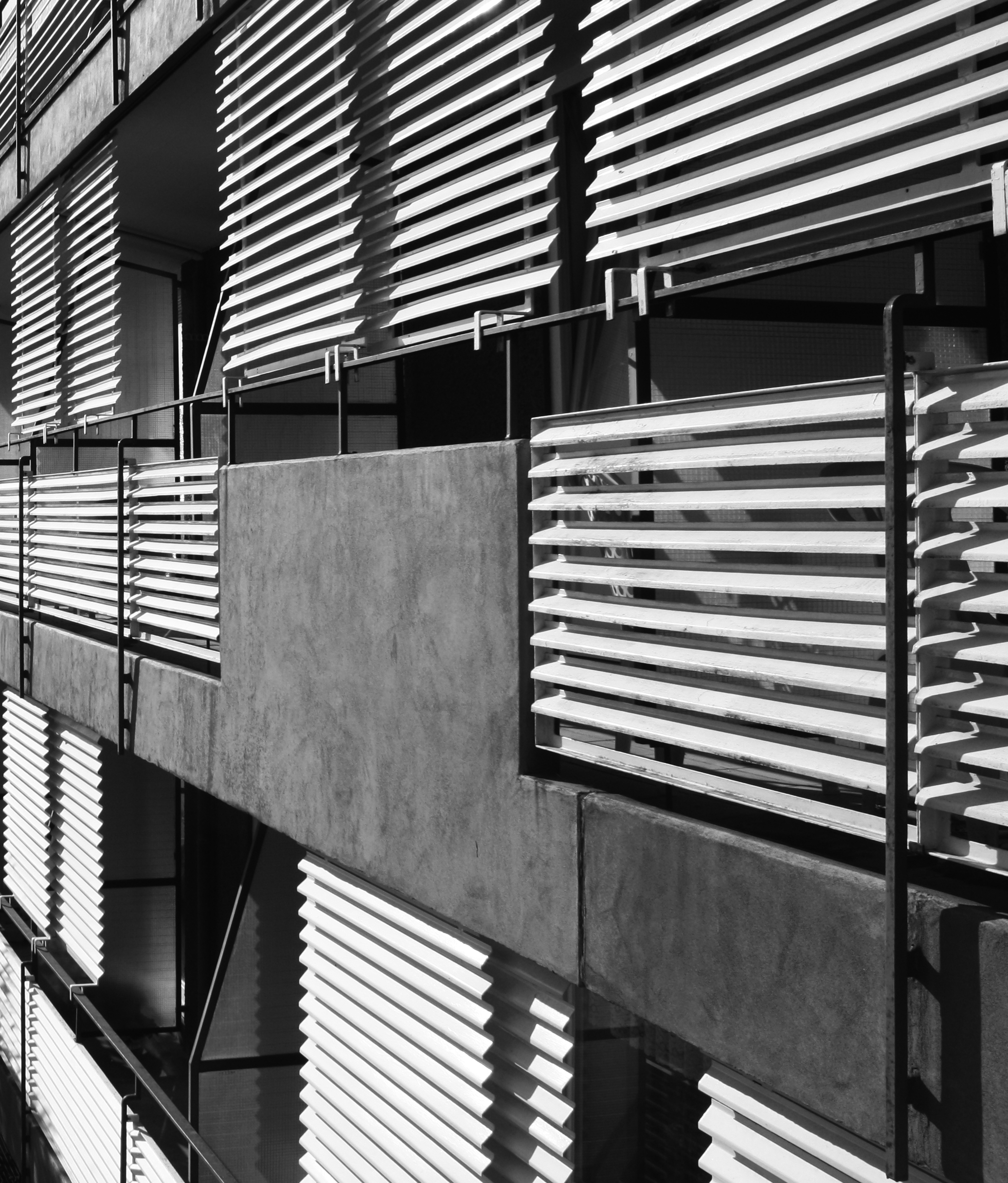 Wilfried Beck-Erlang: Altenwohnheim St. Konrad in Kressbronn, 1956-59 (Detail Fassade) Gebäude abgerssen (2008)